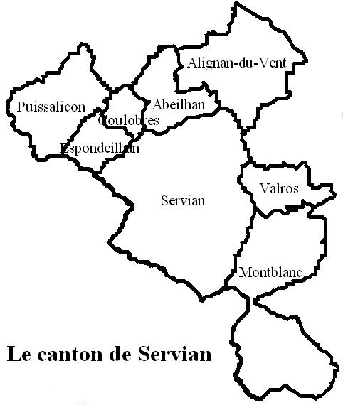 Le canton de Servian Image personnelle